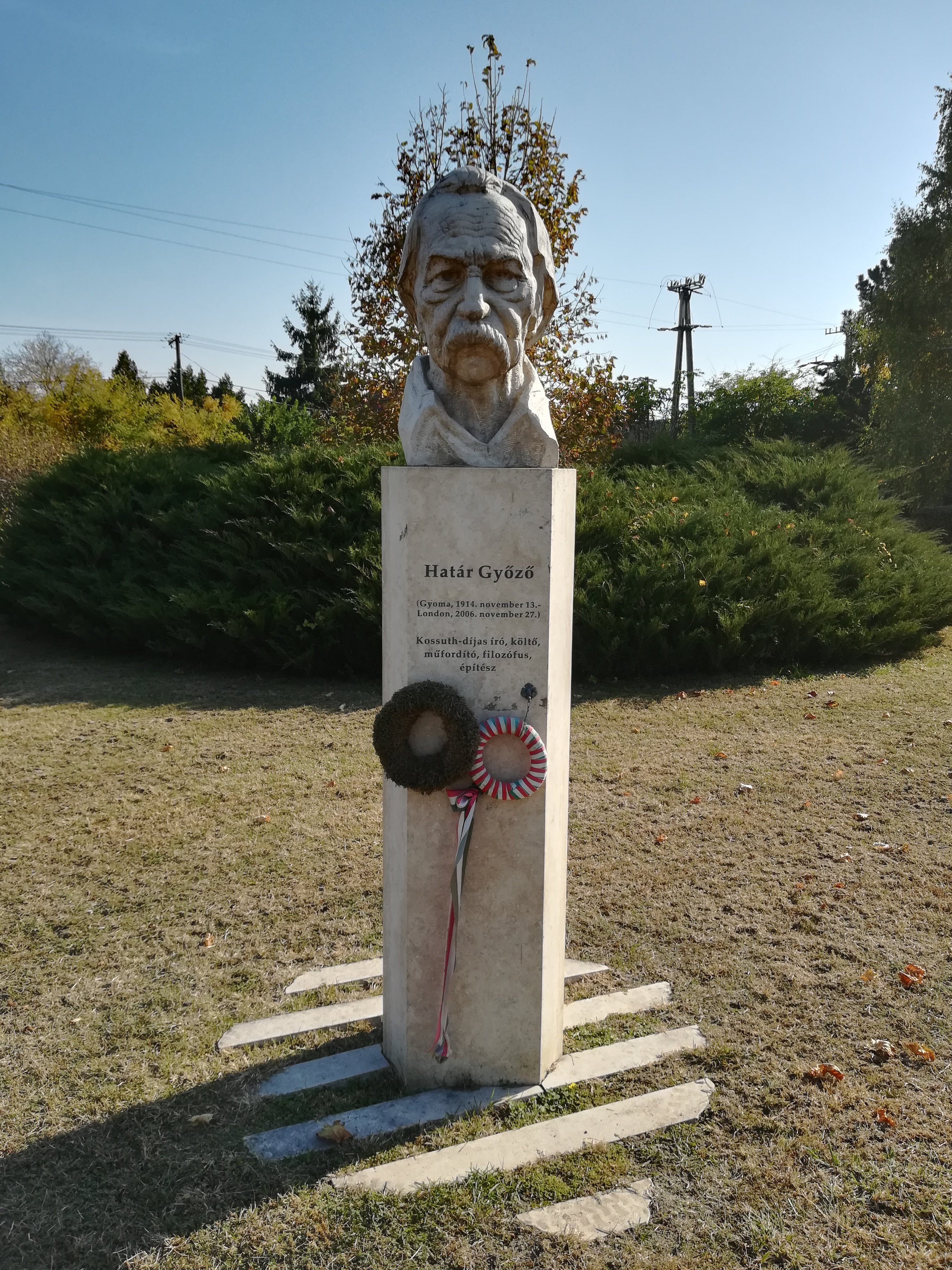 Határ Győző szobor és emléktábla Gyomaendrődön